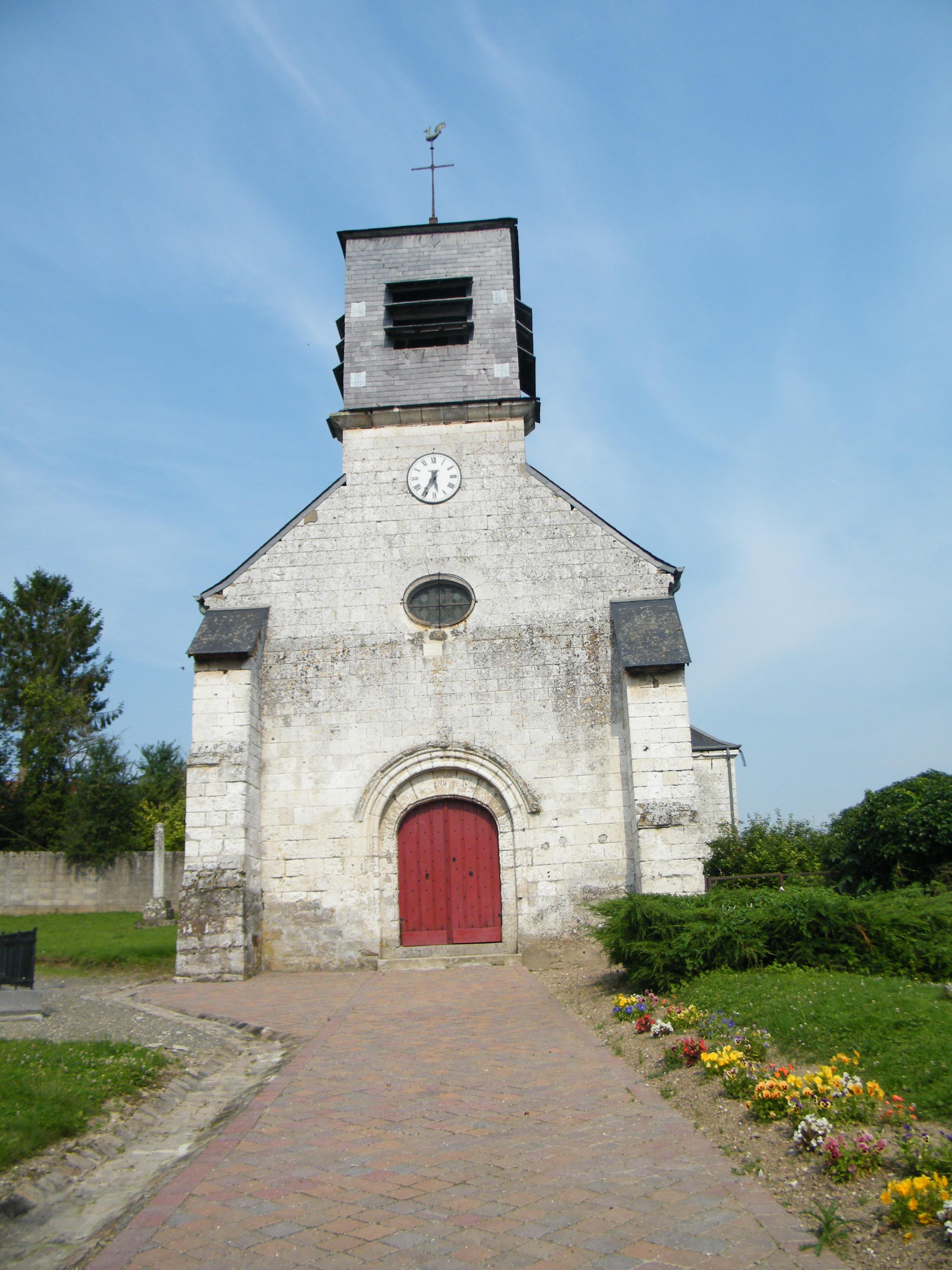 L'église Saint-Martin de Pernois, Somme, France.